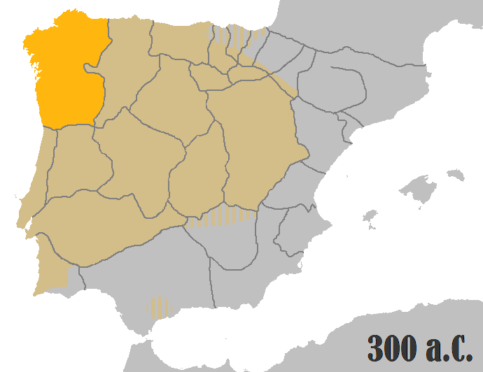 Idioma celta galaico